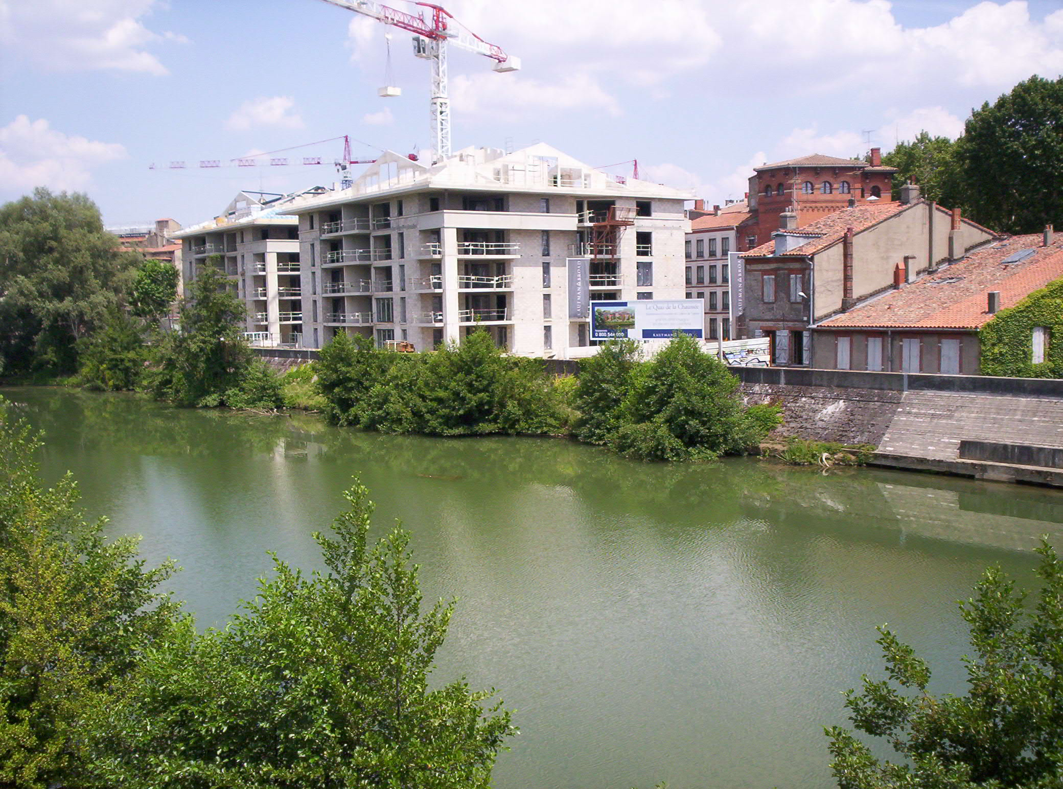 TOULOUSE PAR TONIO94 JUILLET 2006 Photographie prise selon un photo du Dr Bernard Auriol, sur le Pont Saint-Michel, à Toulouse, pour illustrer l'activité de construction fébrile qui y règne. On trouvera des photos analogues sur le site